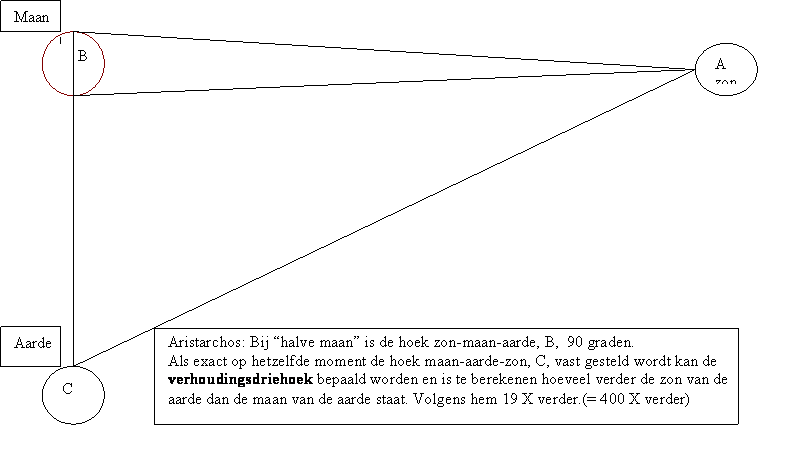 Aristarchos'Berekening. De zon moet men 19 X verder weg denken dan de afstand aarde-maan, dus ver naar rechts buiten de tekening. In werkelijkheid staat de zon zo ver weg naar rechts (wij weten: 400 X aftand aarde-maan) dat ook de hoek C dicht bij 90 graden komt. Dit was een enorm rekenkundig probleem.